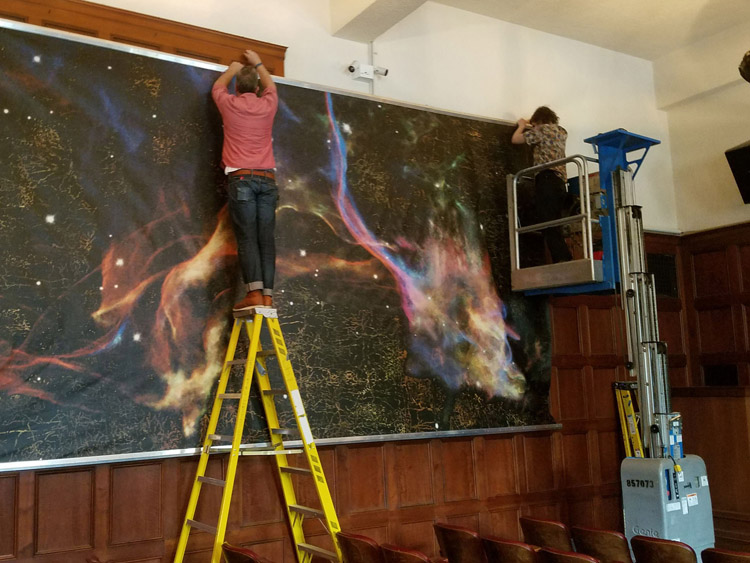 Meno kūrinio instaliavimas Orientalistikos institute